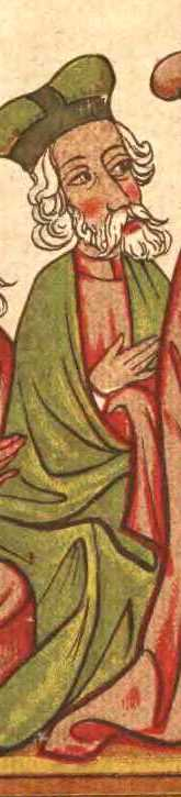 Trojden I